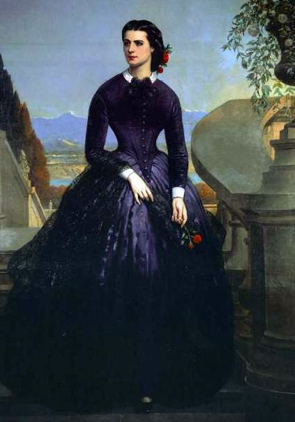 Retrato de la multimillonaria empresaria chilena del siglo XIX Isidora Goyenechea realizado en París junto con el de su marido Luis Cousiño